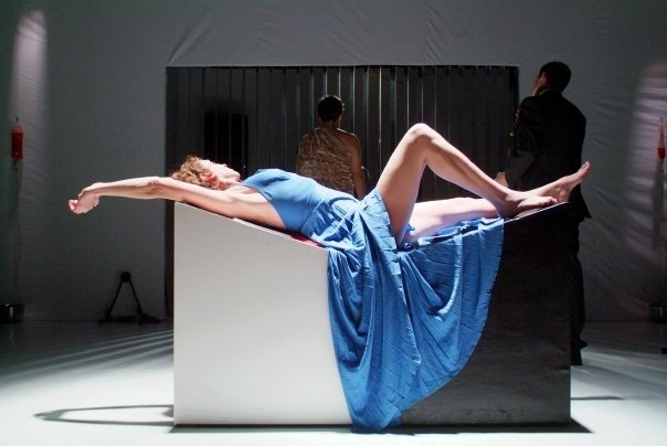 לני שחף מתוך פדרה מאוהבת